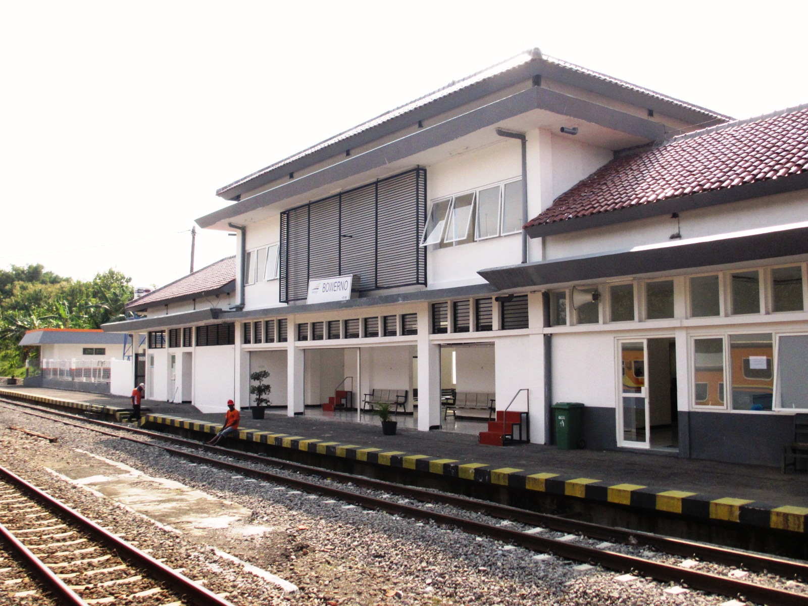 Bangunan baru Stasiun Bowerno, Bojonegoro.